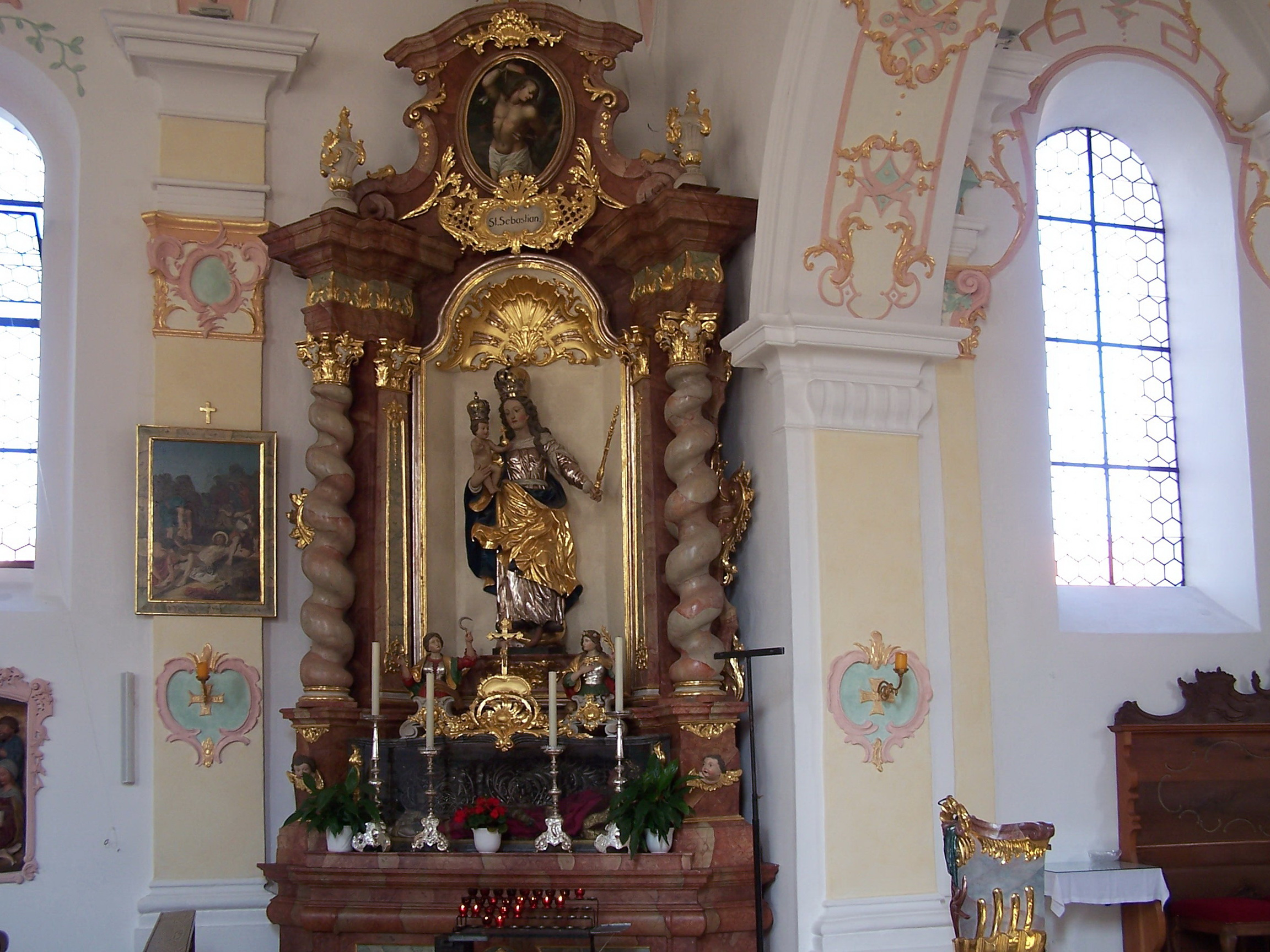 Langquaid Marktplatz 14. Katholische Pfarrkirche St. Jakob d. Ä. Saalkirche mit Steildach, eingezogenem Rechteckchor und Chorscheitelturm, Portalvorhalle nach Süden, Chor und Turm im Kern romanisch, 13. Jahrhundert, Langhaus spätgotisch, 15. Jahrhundert, Barockisierung der Anlage um 1740, Verlängerung nach Westen. Linker Seitenaltar mit zwei Pilastern und zwei gewundenen Säulen. Madonna in Form der Patrona Bavaria mit Jesuskind.